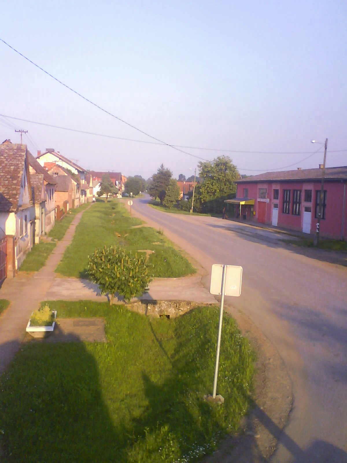 Centar Banovaca Hrvatska